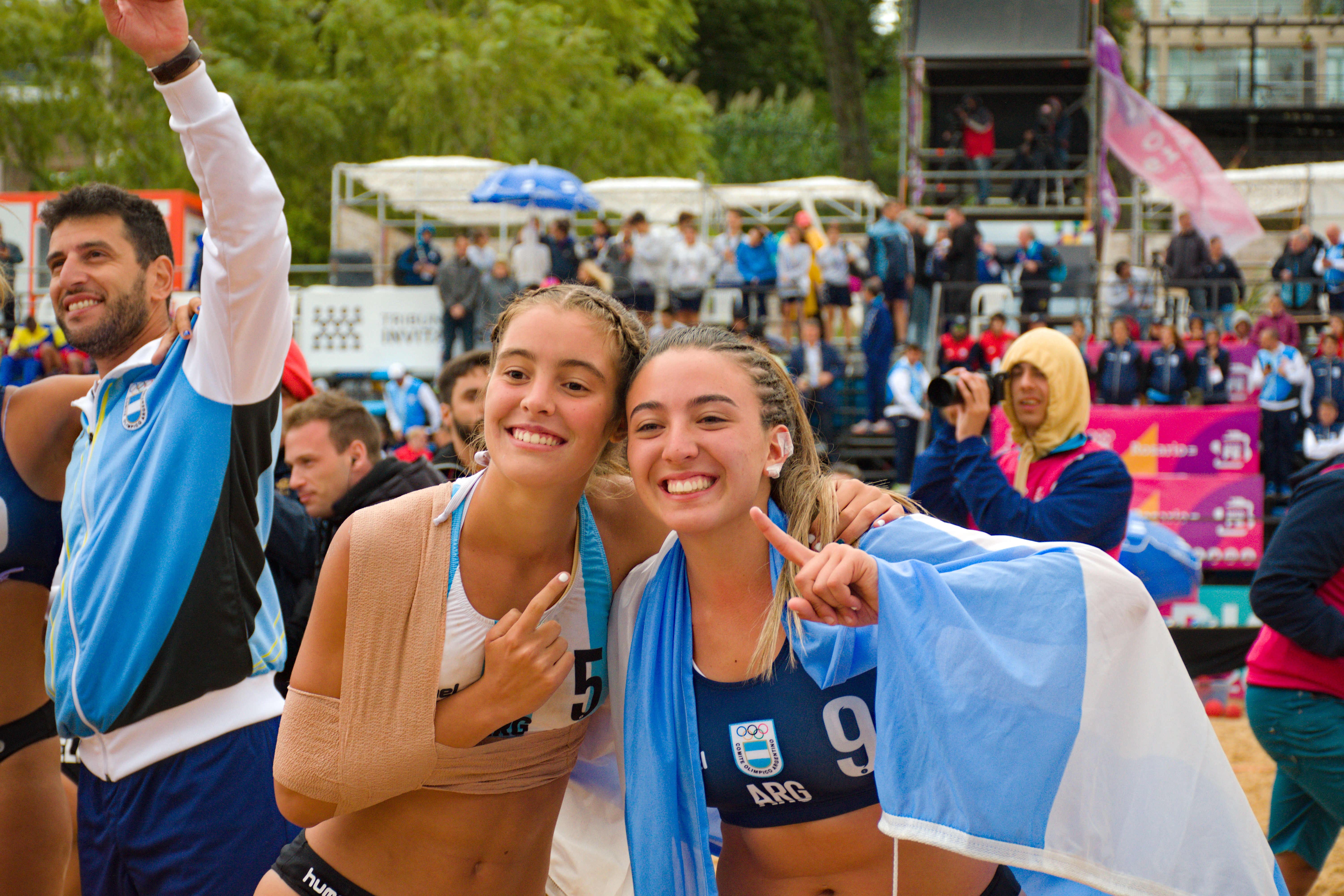 Partido por la final femenina de handball entre Argentina y Brasil en los Juegos Suramericanos de Playa 2019